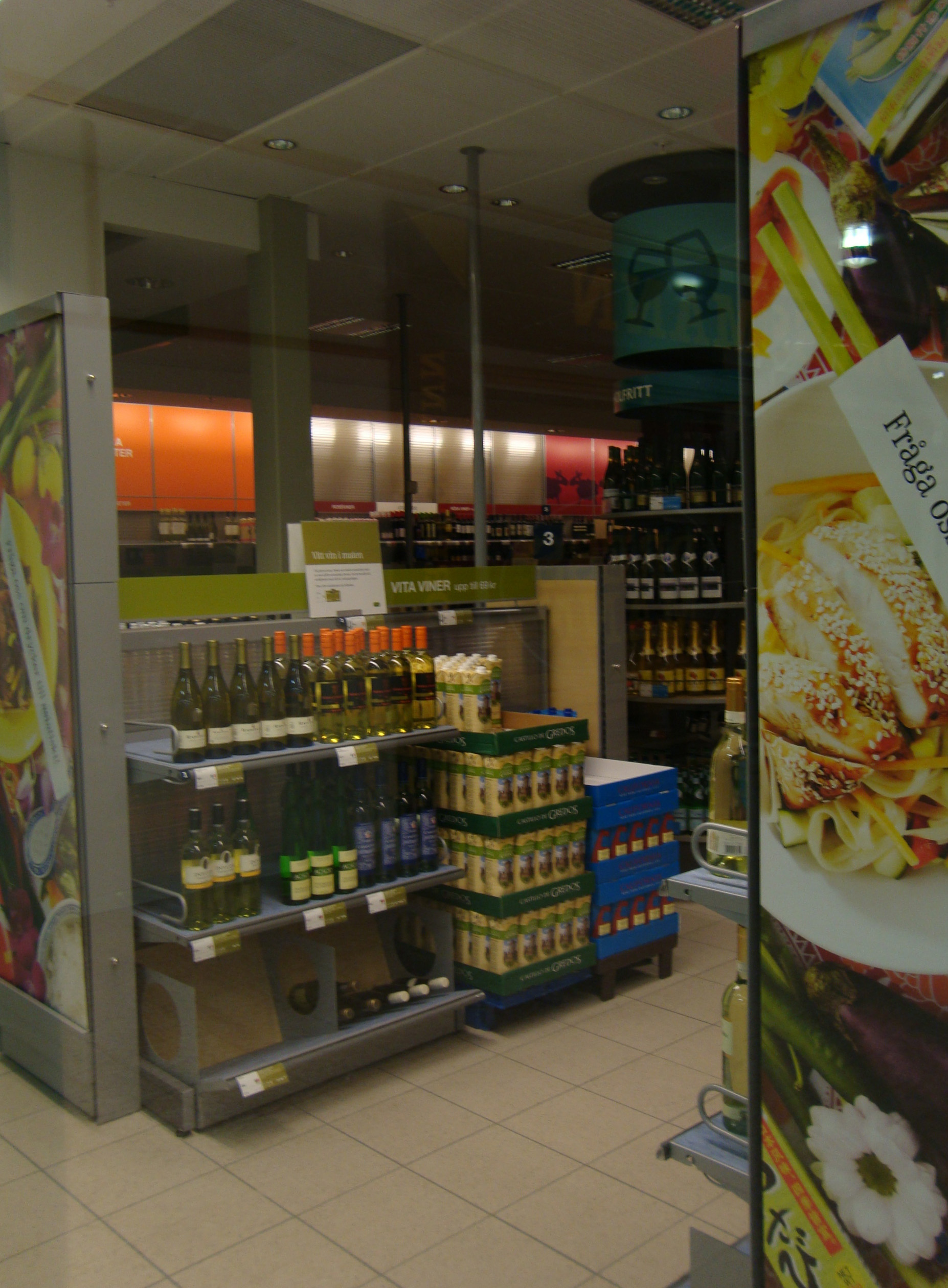 Vinutbud på Systembolaget i Amiralen, Karlskrona